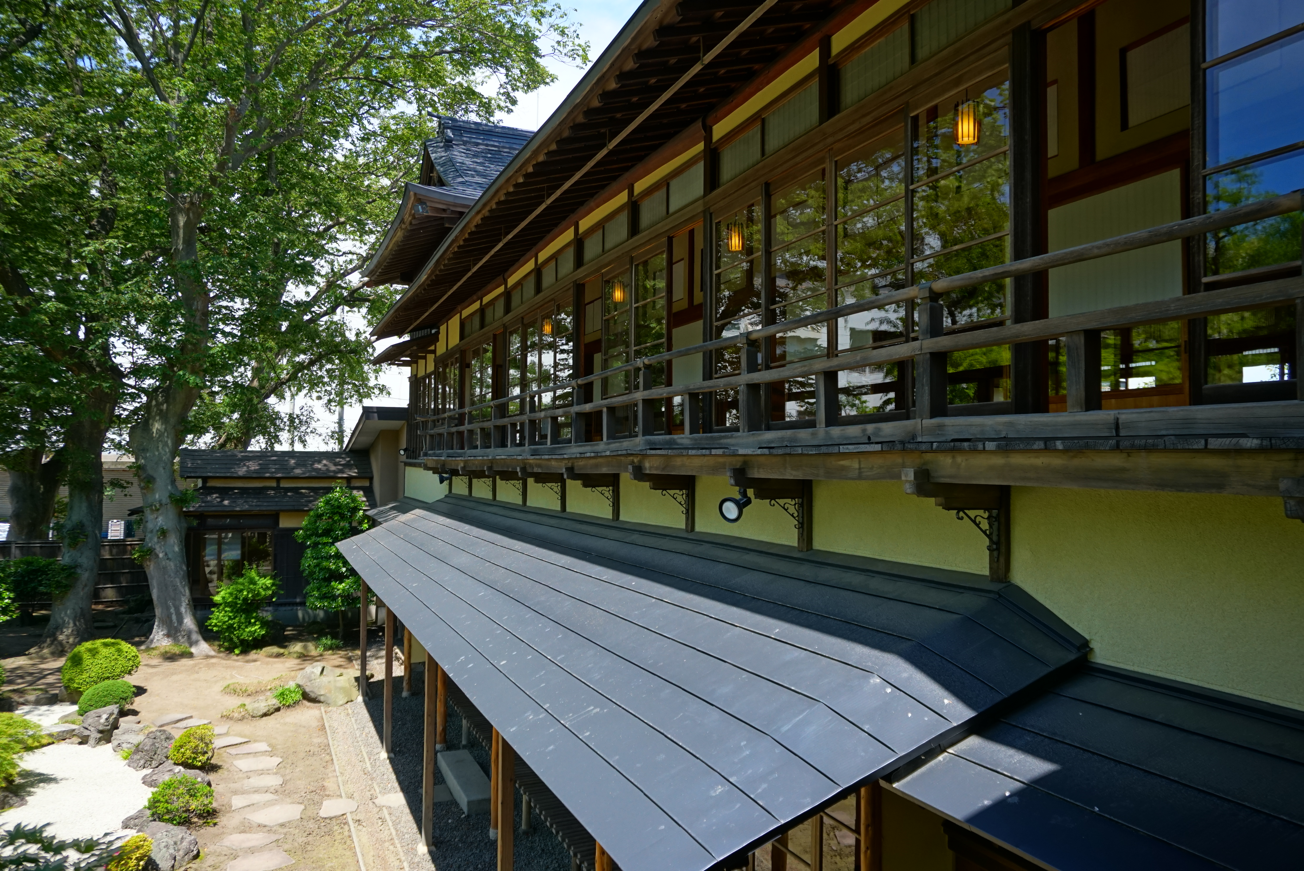 能代市観光交流施設、旧料亭金勇。秋田杉の天然材をふんだんに用いたかつての料亭で、2009年に料亭としては廃業し、施設が市に寄贈された。その後2013年に市の観光交流施設として再オープンしている。国の登録有形文化財に登録された豪奢な建物は、「東洋の木都」と称された工業都市、能代の往時の繁栄を伝える。